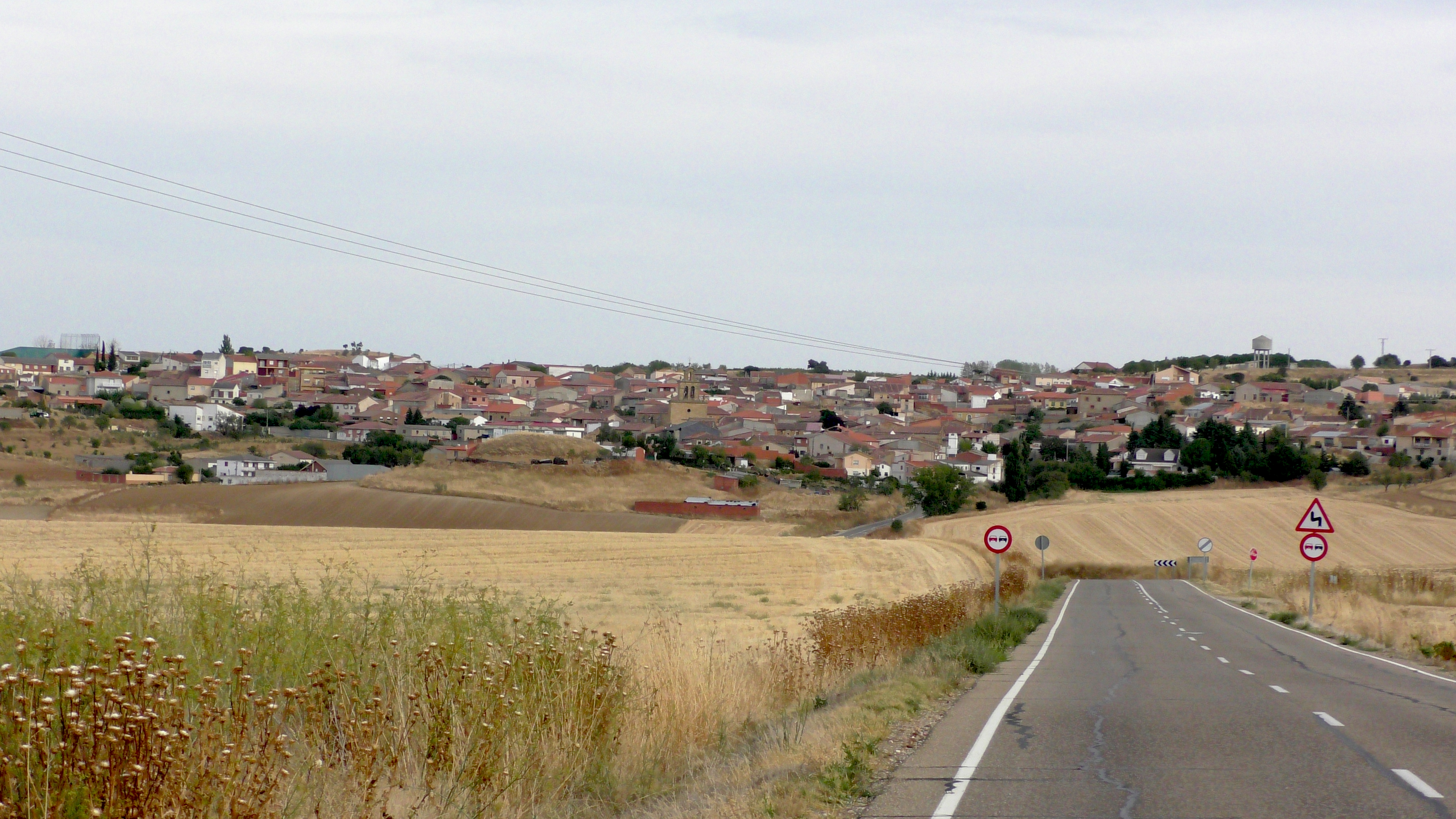 Sanzoles